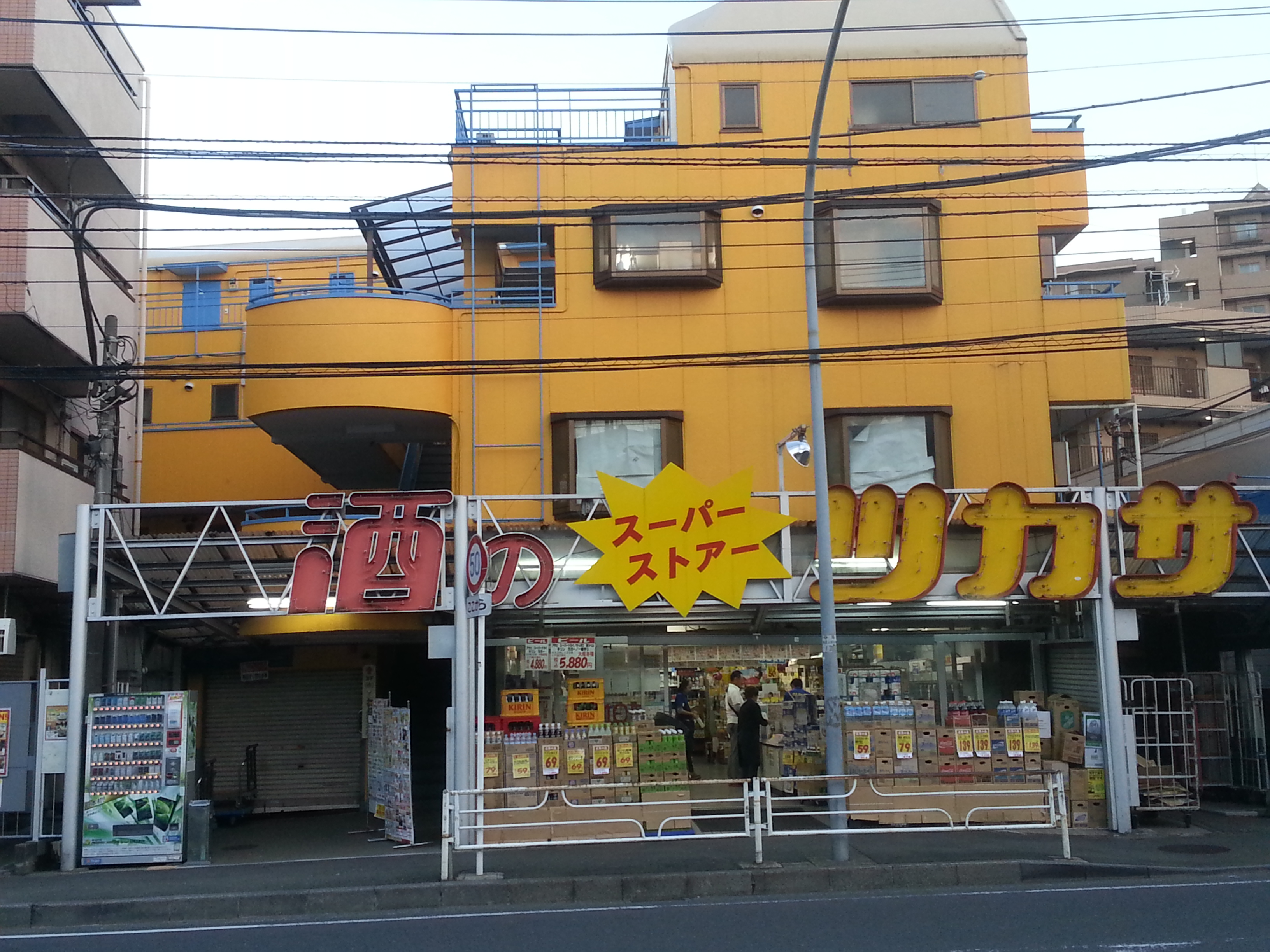 酒のツカサ二俣川本店（一号店）。